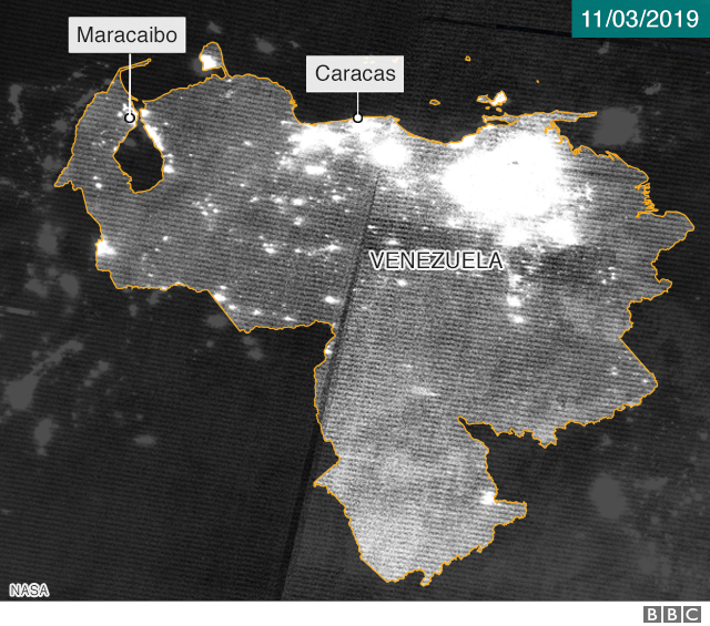 Imagem satélite nocturna Venezuela e Brazil a 11 de Março de 2019